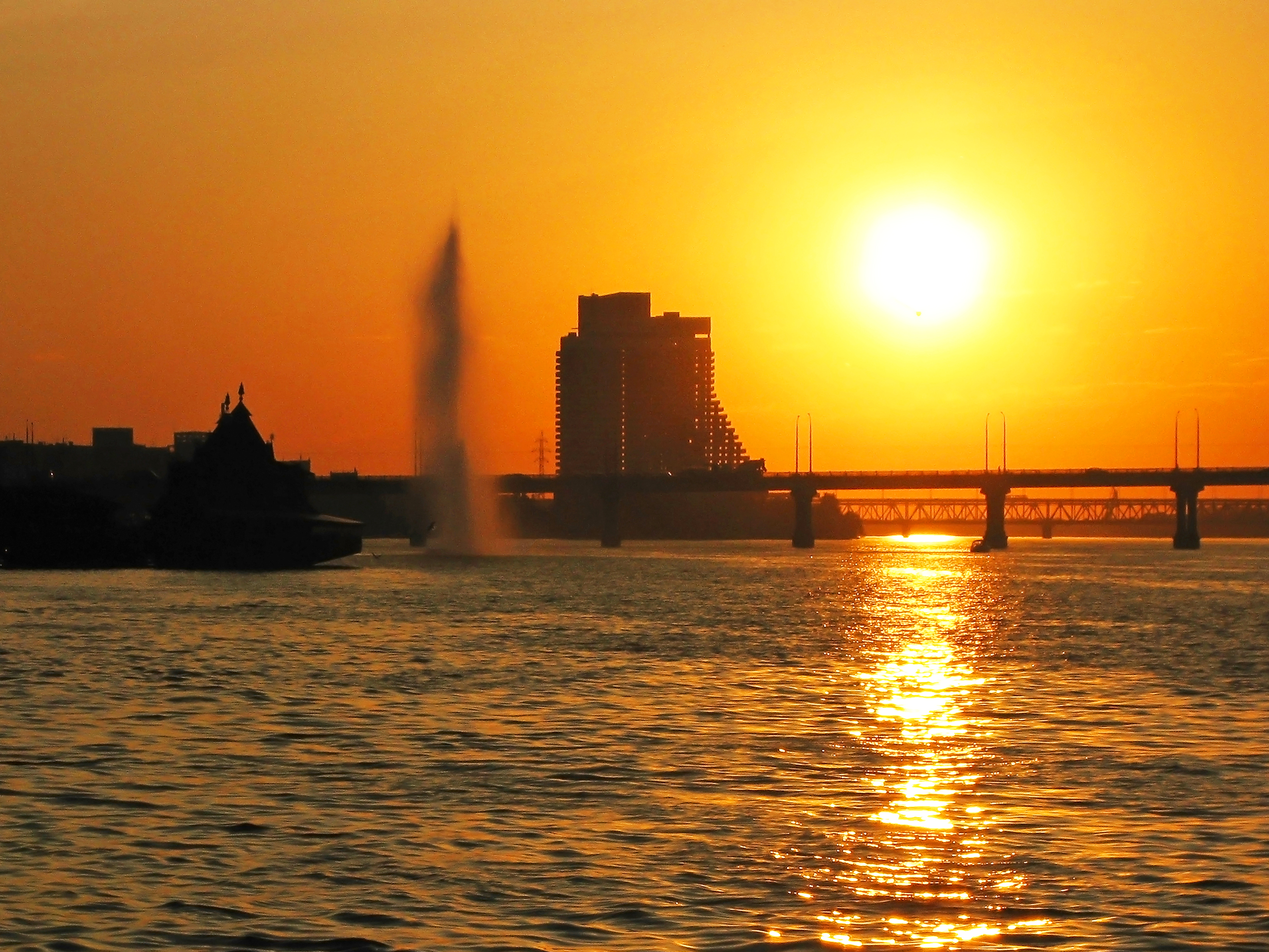 Вечером на Фестивальном причале, г.Днепропетровск